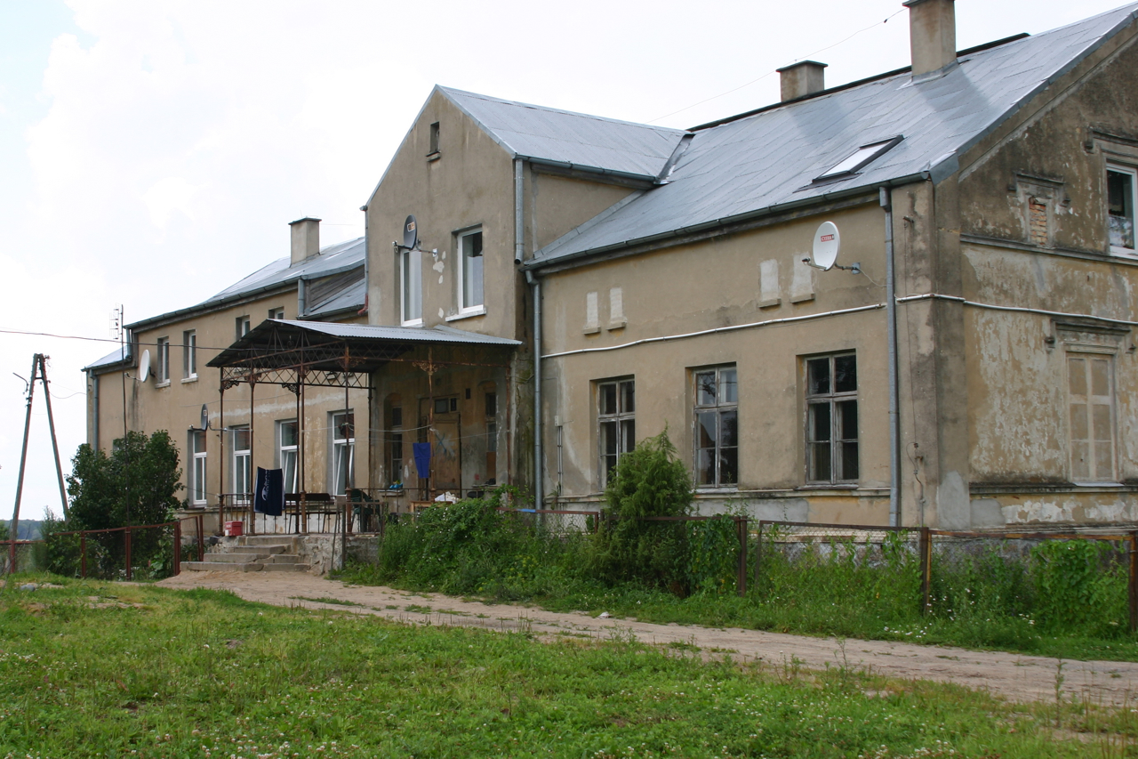 Chojnica, Polska, powiat kętrzyński.